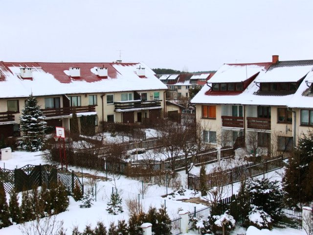 Szeregowa zabudowa Osowej Fot. Paweł Stefanowski